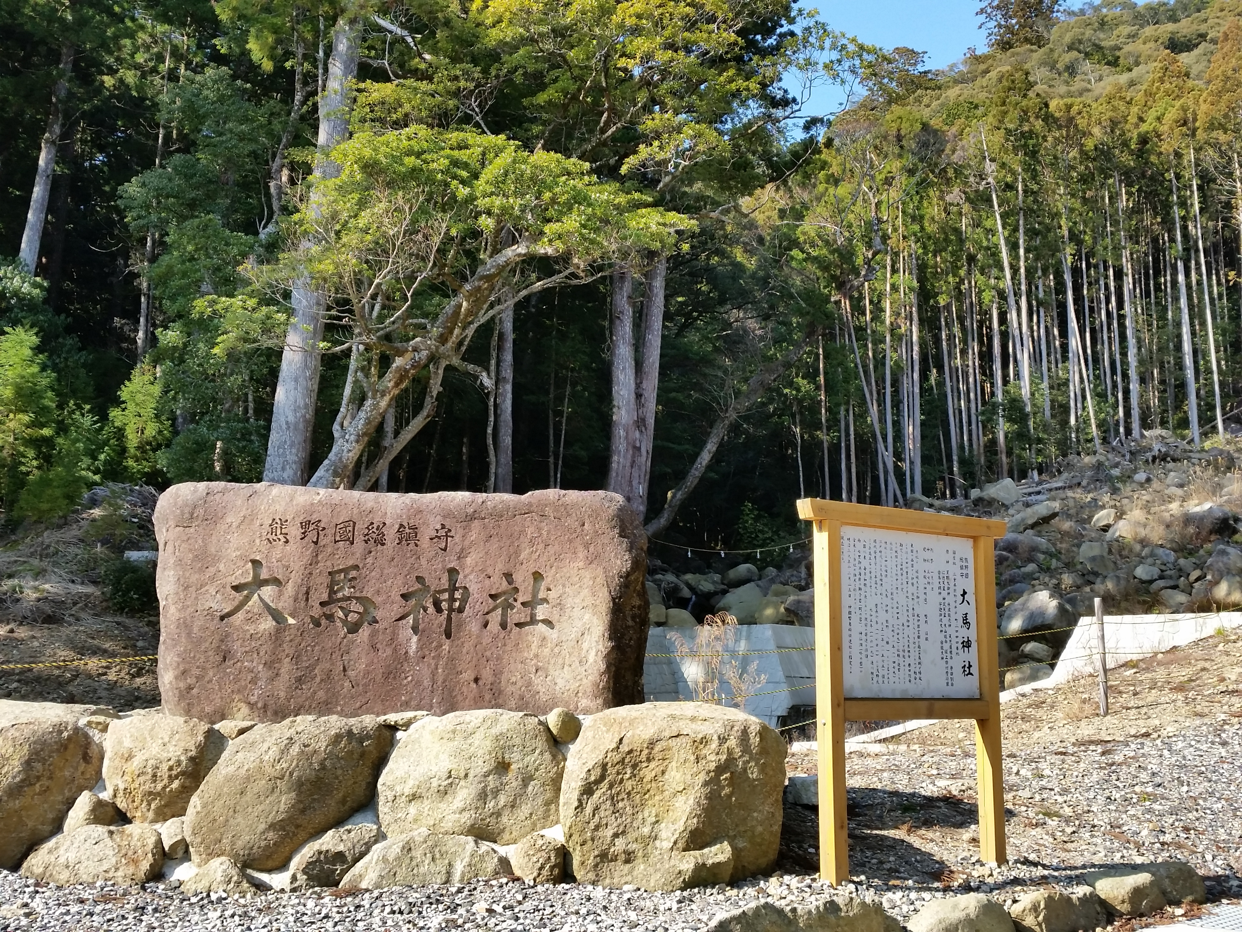 大馬神社の入り口になります